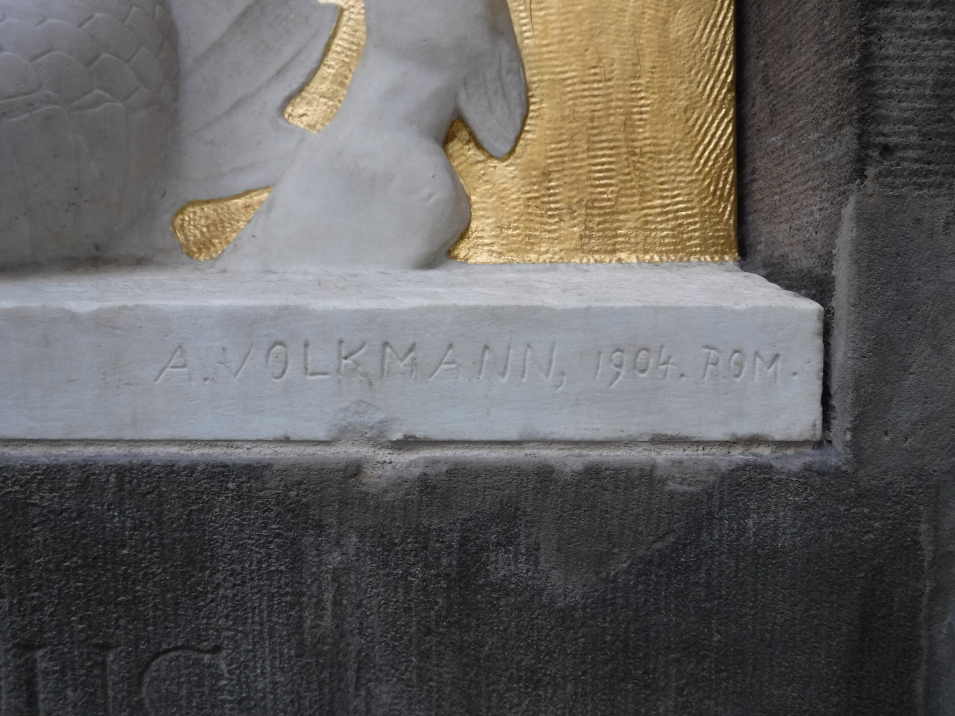 Georgsbrunnen (Dresden) - Signator A. VOLKMANN, 1904. ROM.